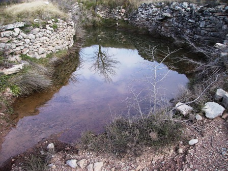 Bassa a la Serra de Castelltallat Image:Bassa-Pond_12_febrer_2006_020.jpg